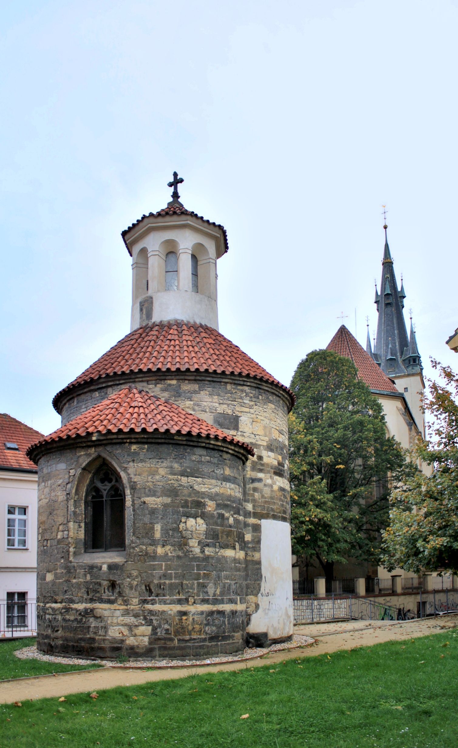 Praha-Nové Město, rotunda sv. Longina